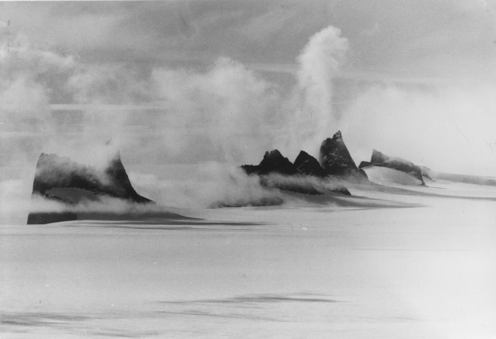 Fenriskjeften, der westliche Teil der Drygalskiberge, von Süden gesehen